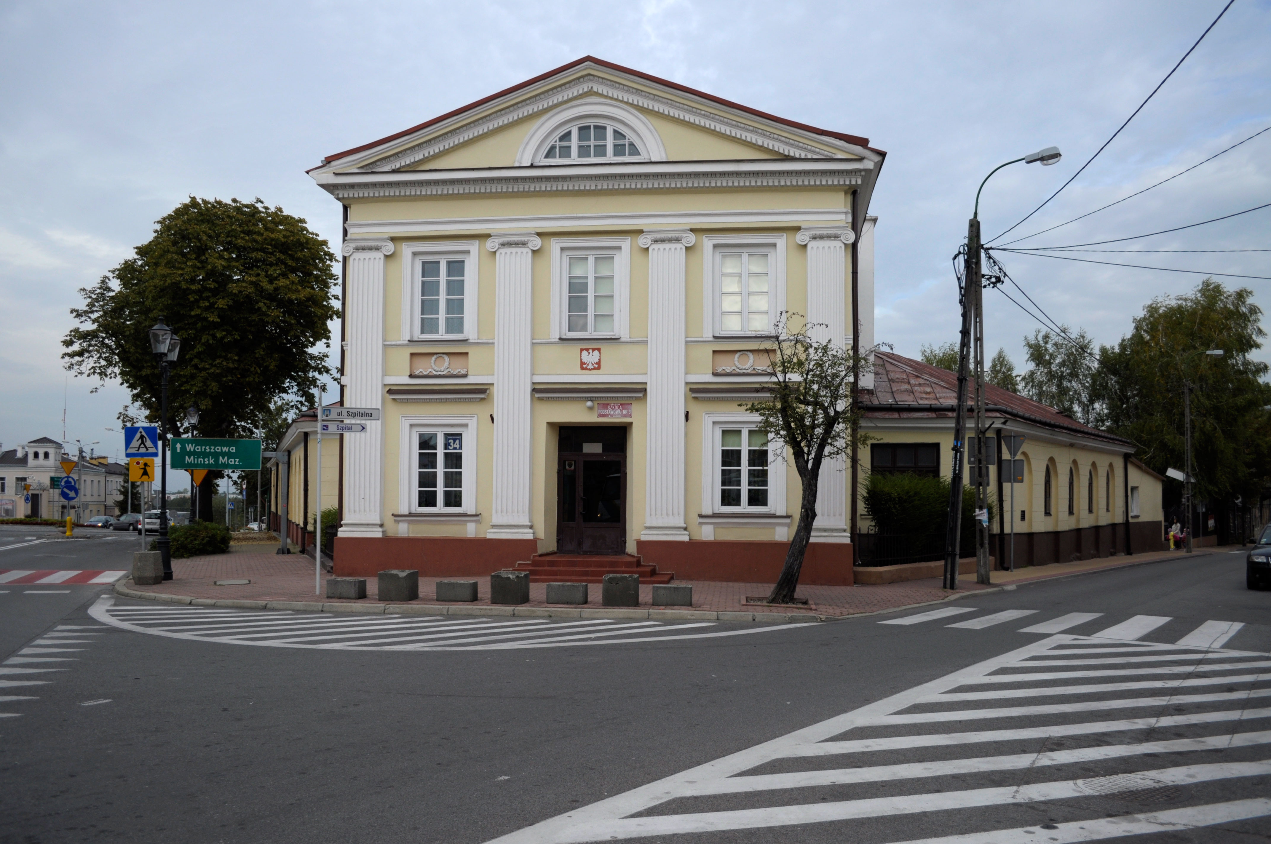 Zabytkowy budynek dawnego gimnazjum w Grójcu. Ul. Armii Krajowej 34. Obecnie Publiczna Szkoła Podstawowa nr 3.